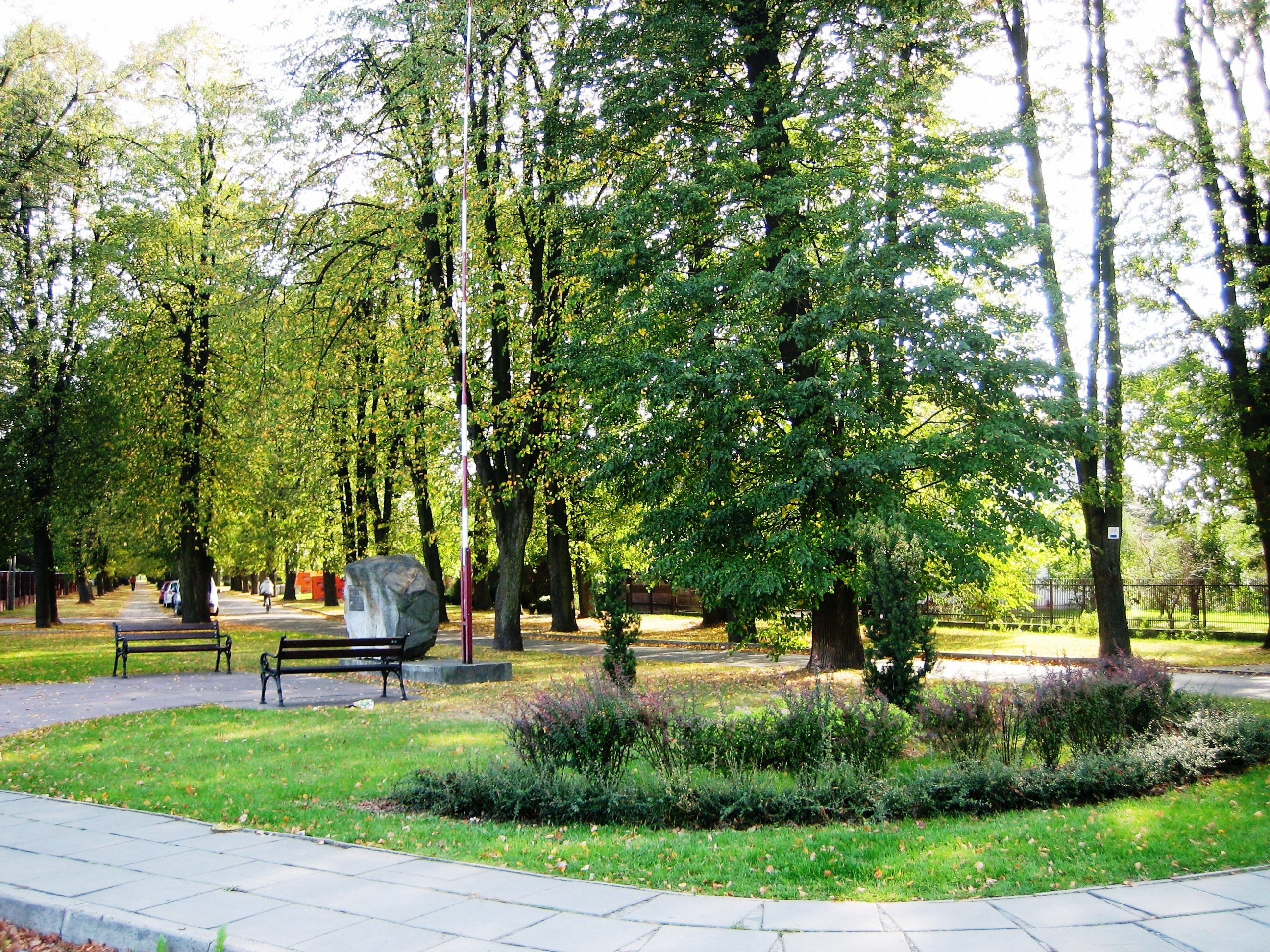 Skwer z kamieniem węgielnym osiedla Nasz Dom (Za Torem) w Tarnowie-Mościcach, ul. Obrońców Lwowa